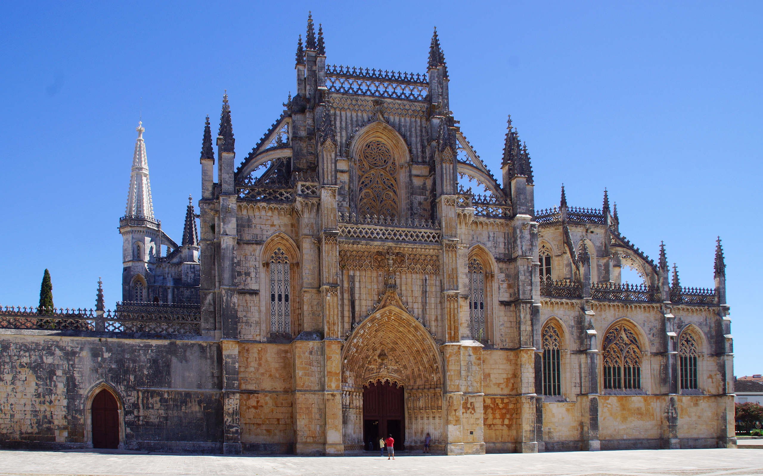 Dominikaner Kloster Mosteiro de Santa Maria da Vitória da Batalha aus dem 14.-16.Jahrhundert Hauptportal im Westen - Batalha liegt in der Prov. Leiria in Portugal, Foto Wolfgang Pehlemann DSC00696